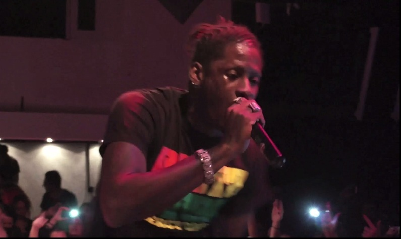 Aidonia live in Sweden